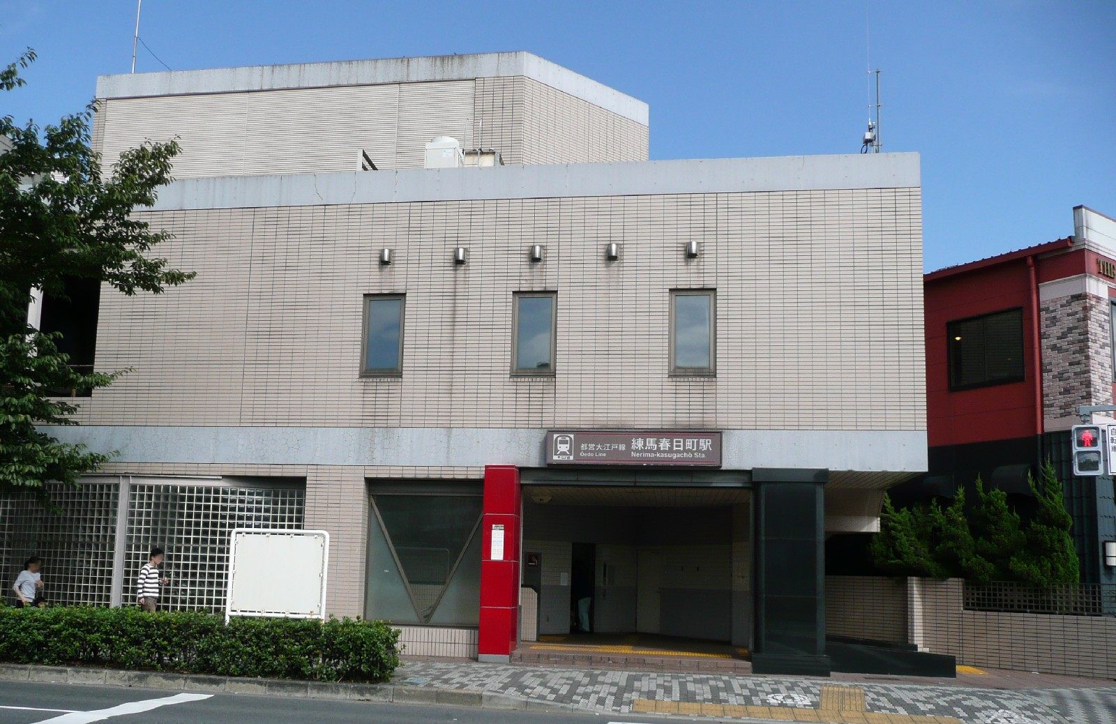 練馬春日町駅A2出入口